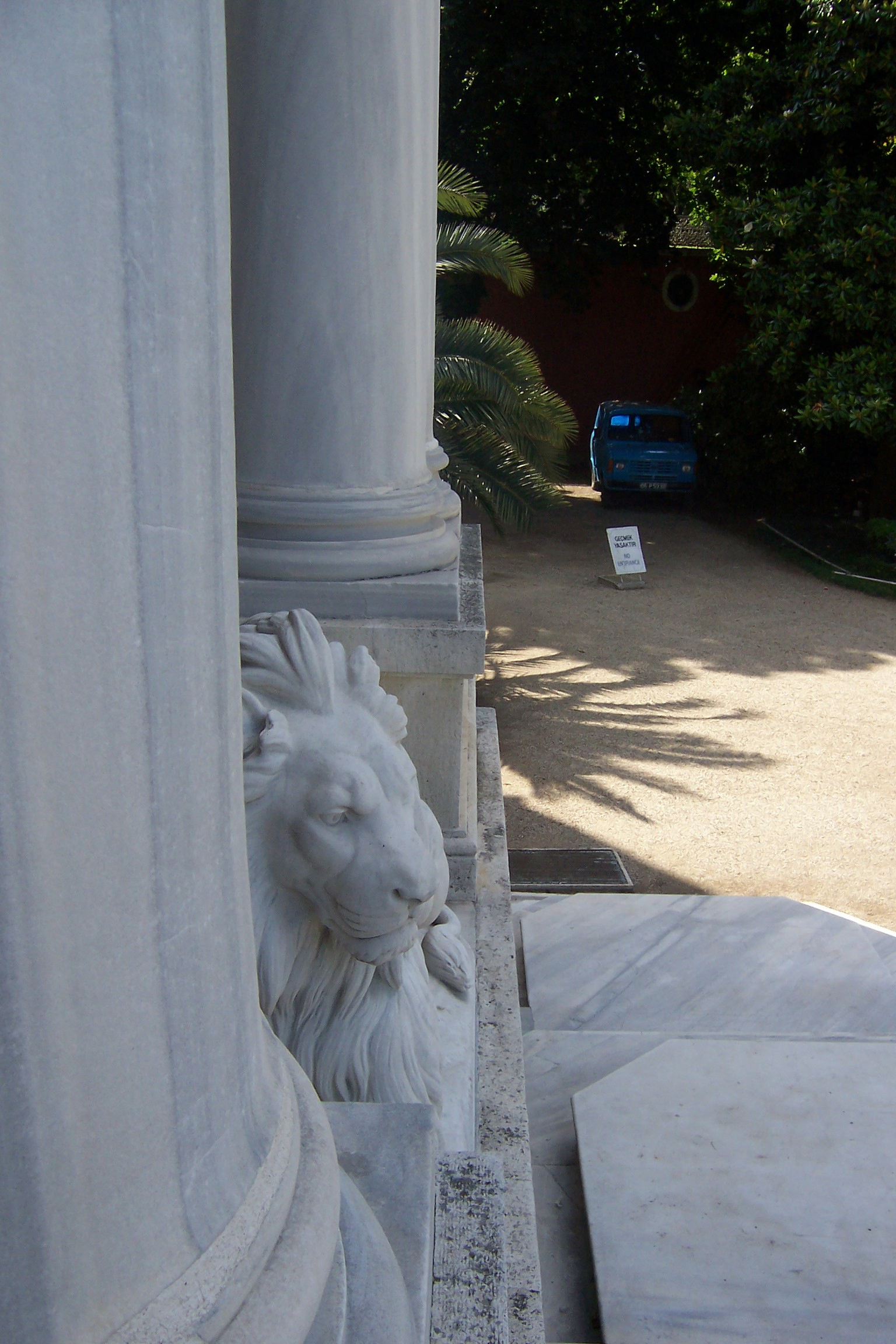 León de mármol, talla del escultor Pierre Louis Rouillard. Forma parte de la serie de 24 esculturas encargadas por el sultán de Turquía para la decoración de los jardines del Palacio de Beylerbeyi